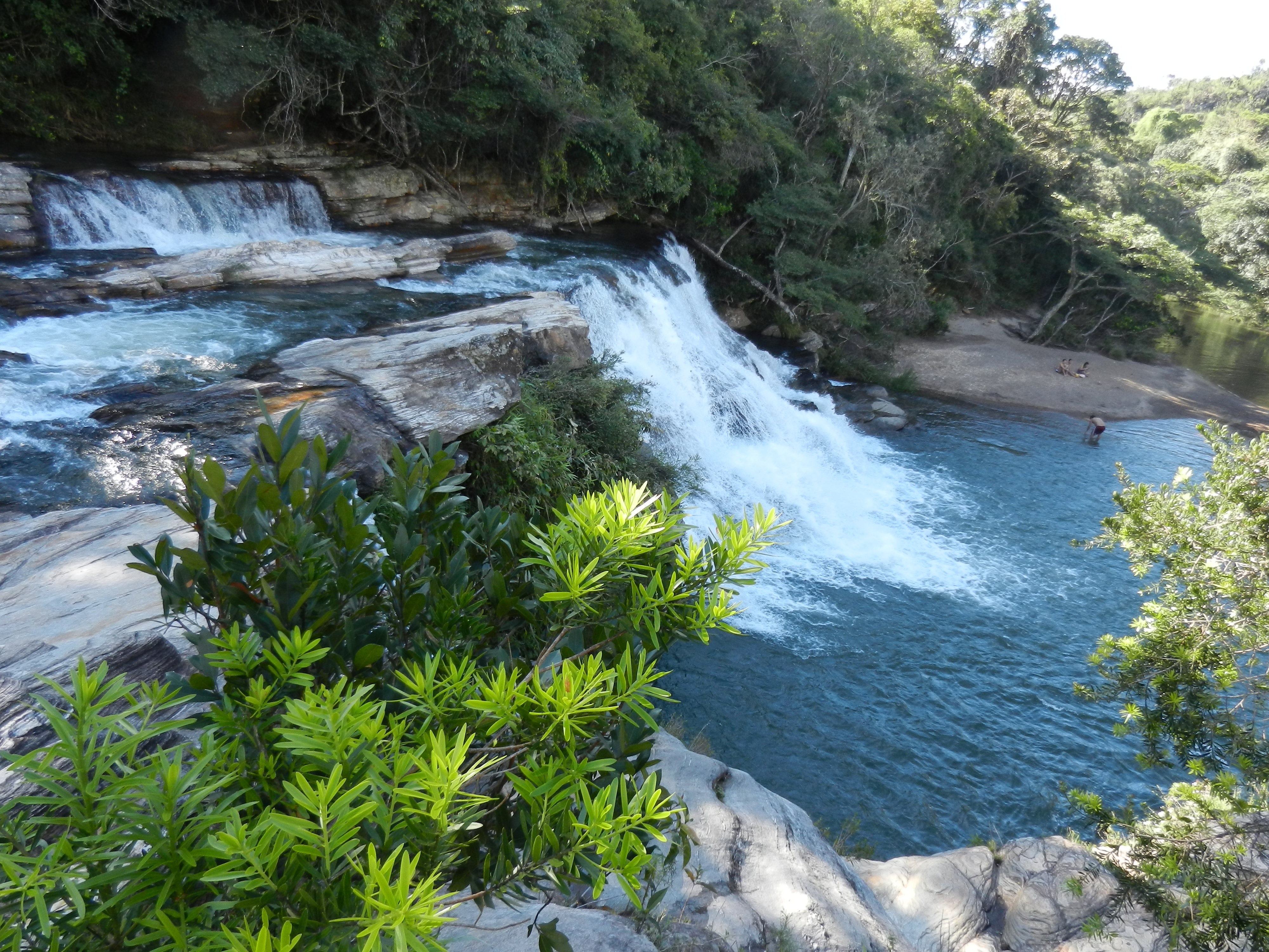 Cachoeira da Zilda em Carrancas